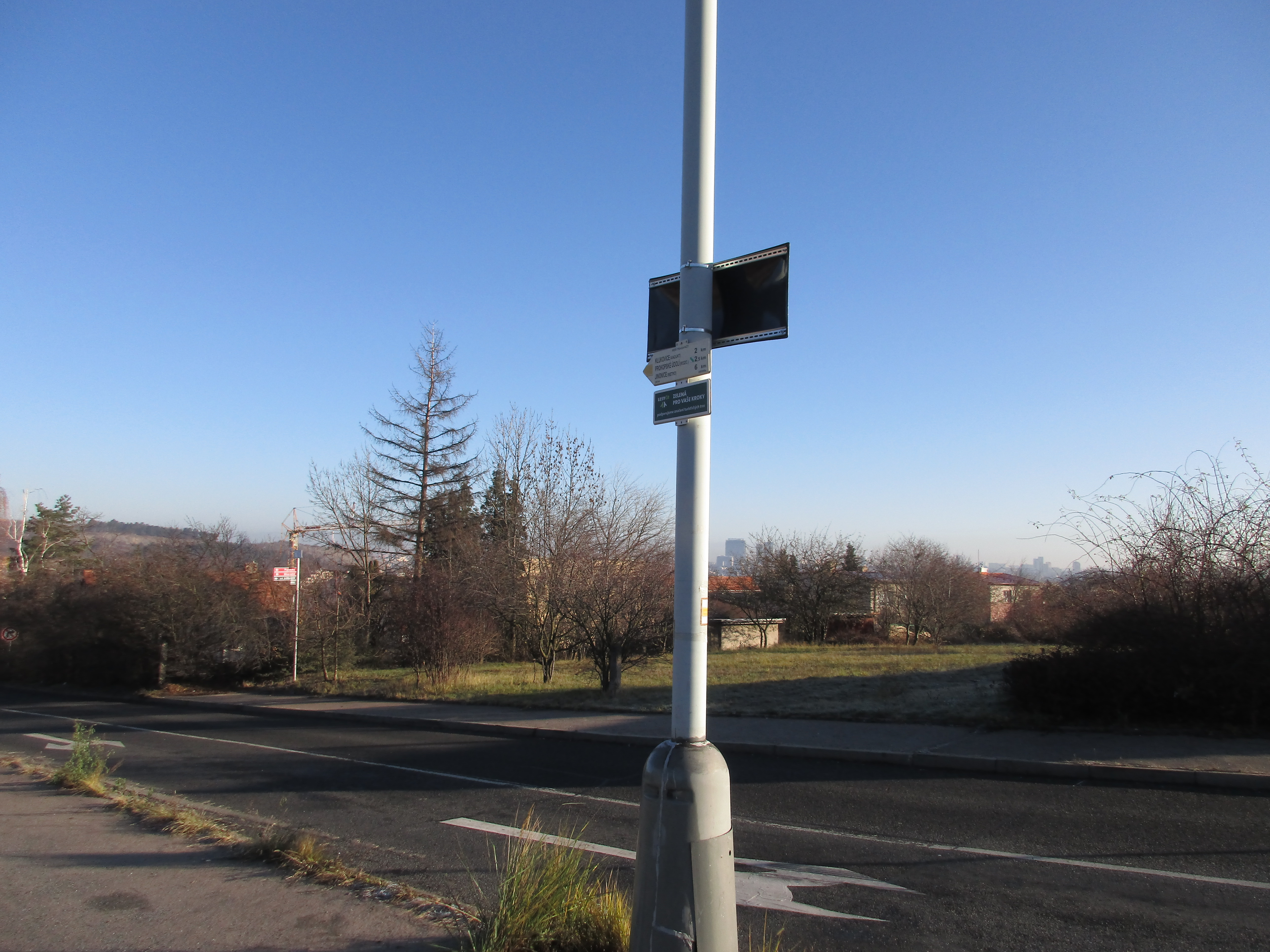 Rozcestník u zastávky MHD Geologická.